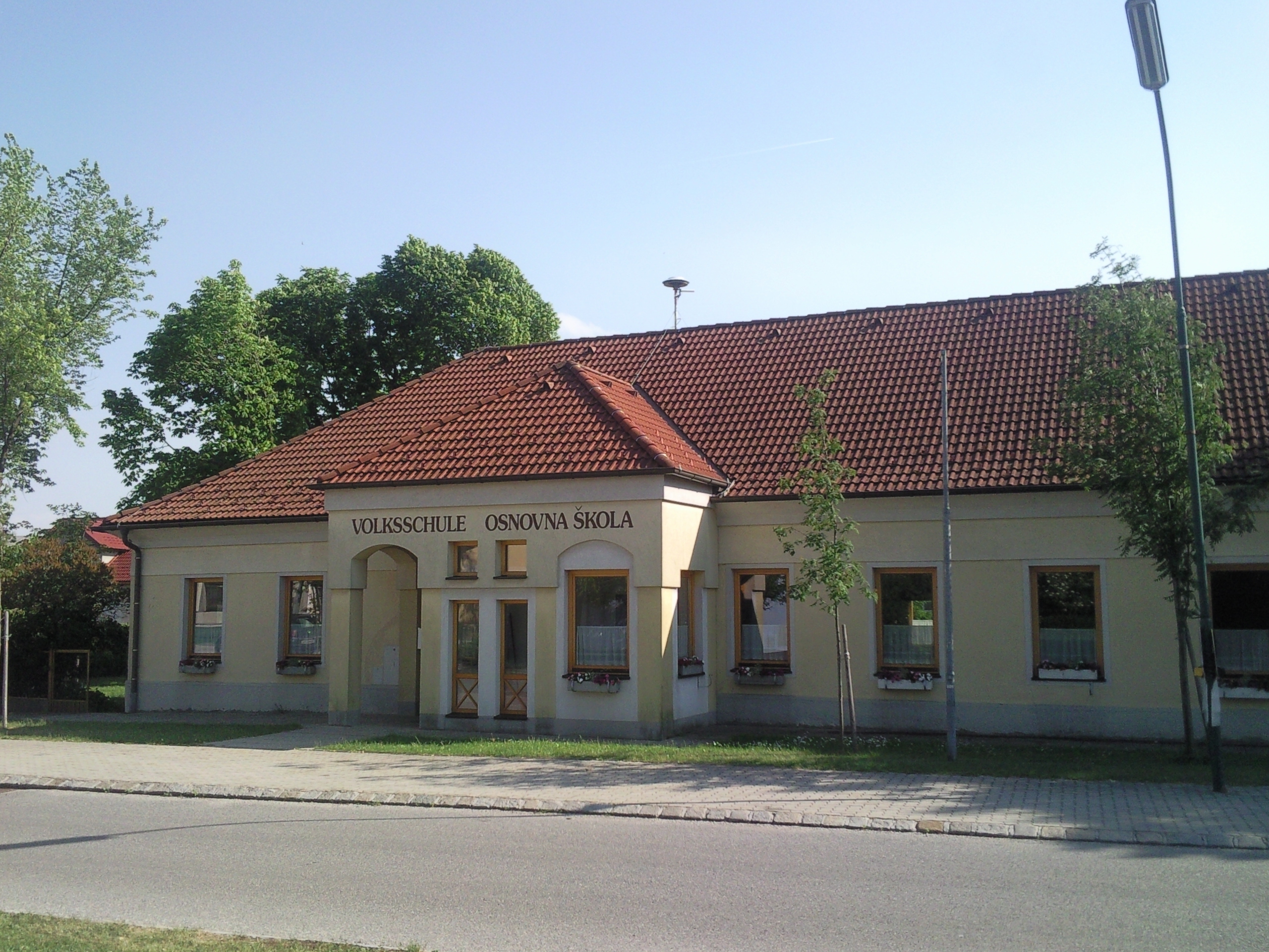 Neudorf